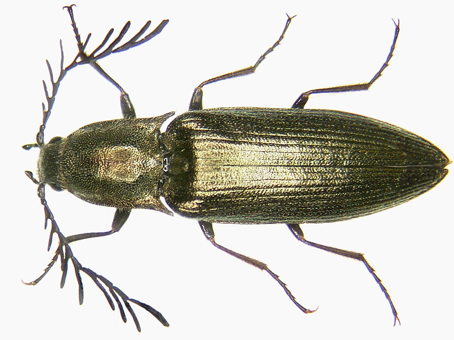 Ctenicera pectinicornis (Linné, 1758) male Familie: Elateridae Groesse: 15-18 mm Verbreitung: Europa bis Sibirien Ökologie: auf feuchten Wiesen Fundort: Germania, Bayern, Oberfranken, Selbitz leg.det. U.Schmidt, 1972 Foto: U.Schmidt, 2005